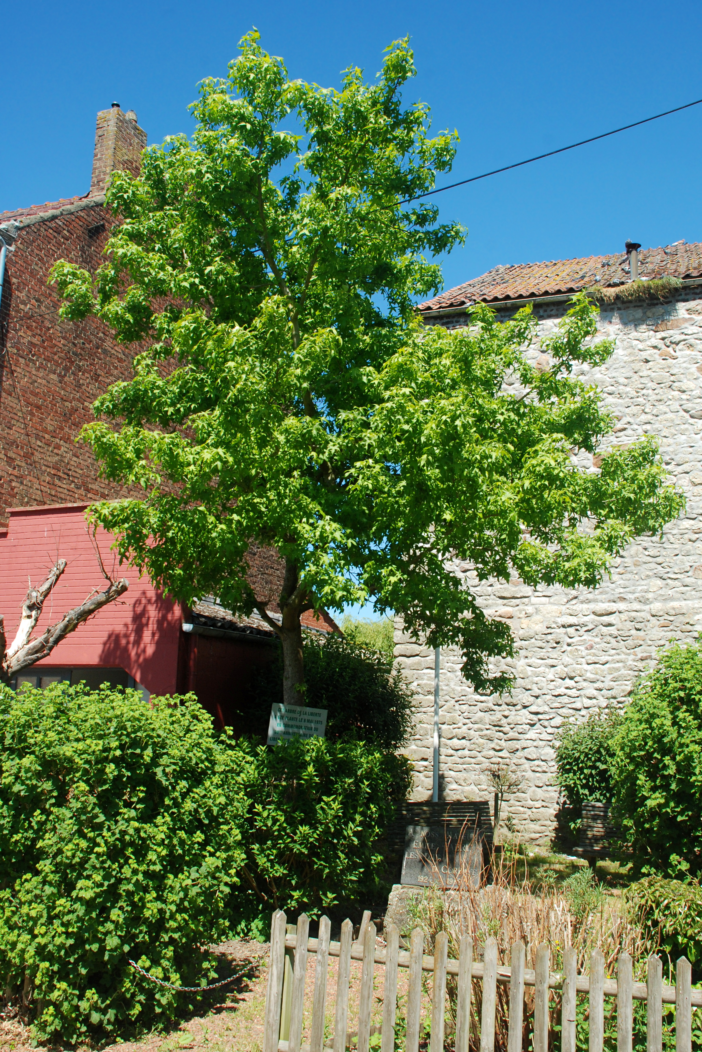 Belgique - Brabant wallon - Mont-Saint-Guibert - Corbais - Tour Griffon du Bois (donjon de Corbais, 13e siècle) - Arbre de la Liberté